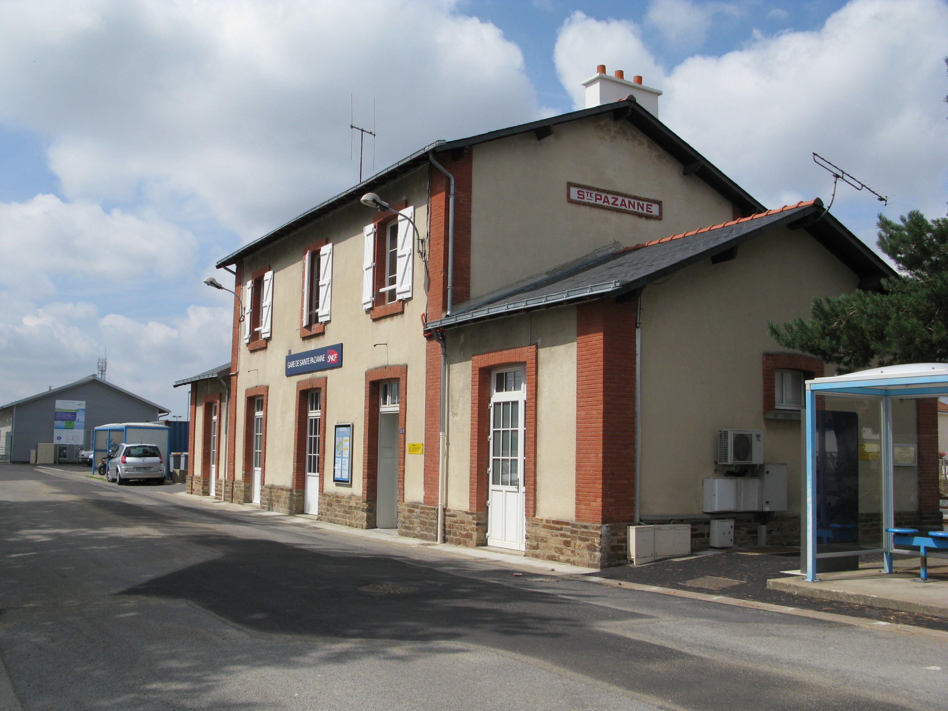 Gare de Sainte-Pazanne